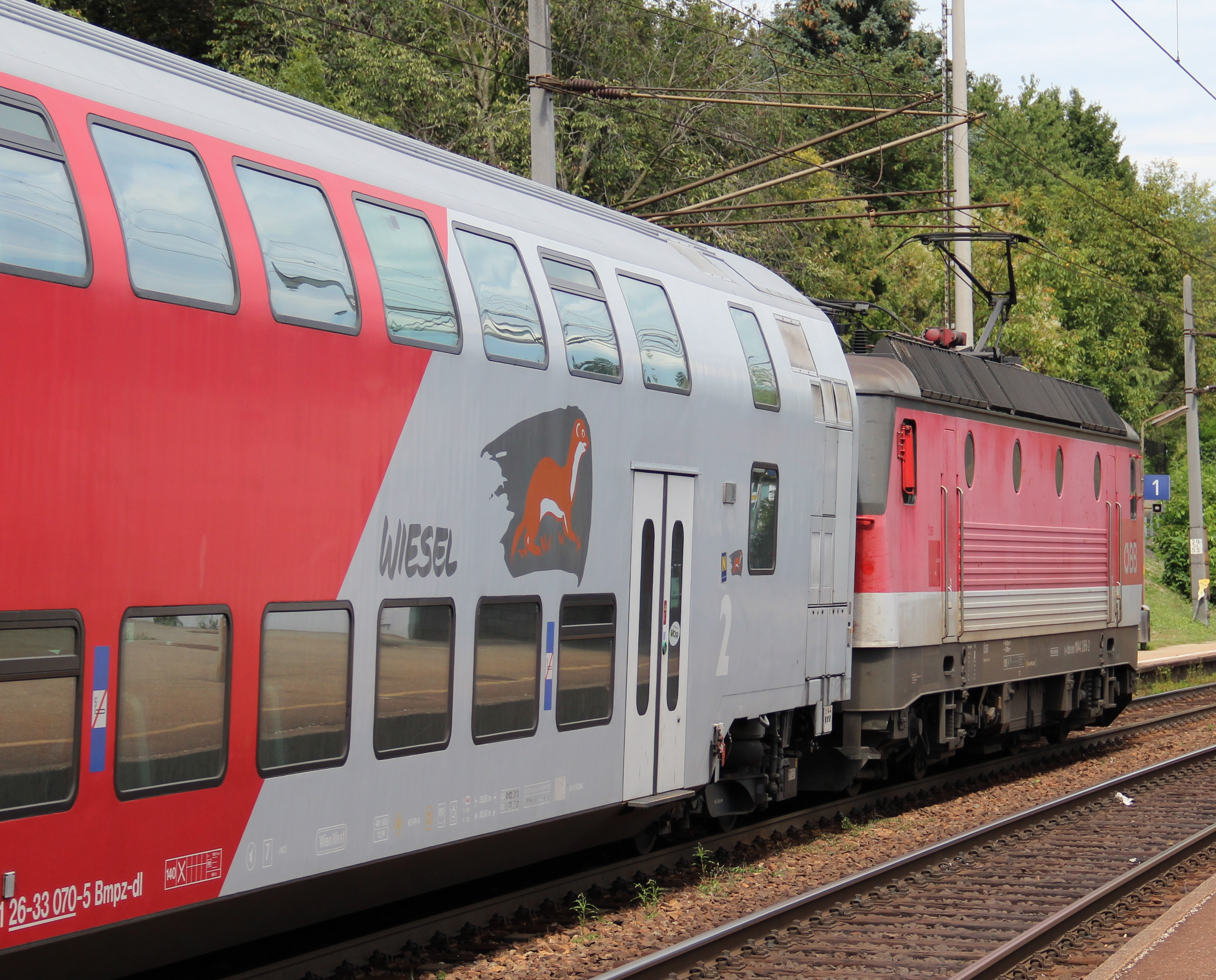 Wiesel-Logo auf einem Doppelstock-Wagen der ÖBB